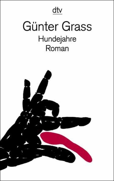 Taschenbuch Titelbild Günter Grass: Hundejahre 1999. Graß, der aggressive Infantilist, streckt - wie der Hund auf dem von Graß gezeichneten Buchumschlag - aller Prätention die Zunge heraus.